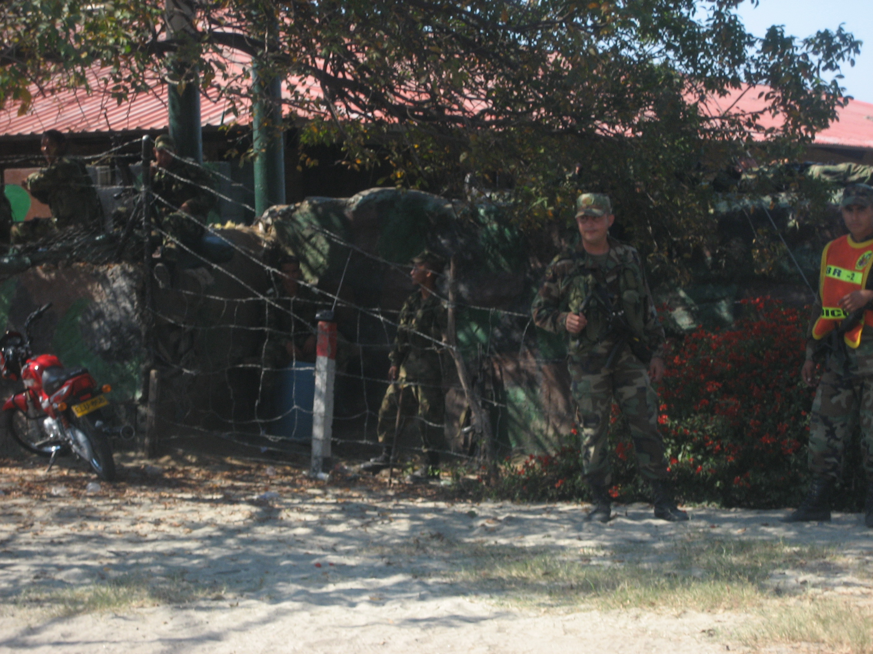 Image of Colombian army personnel, Santa Marta.